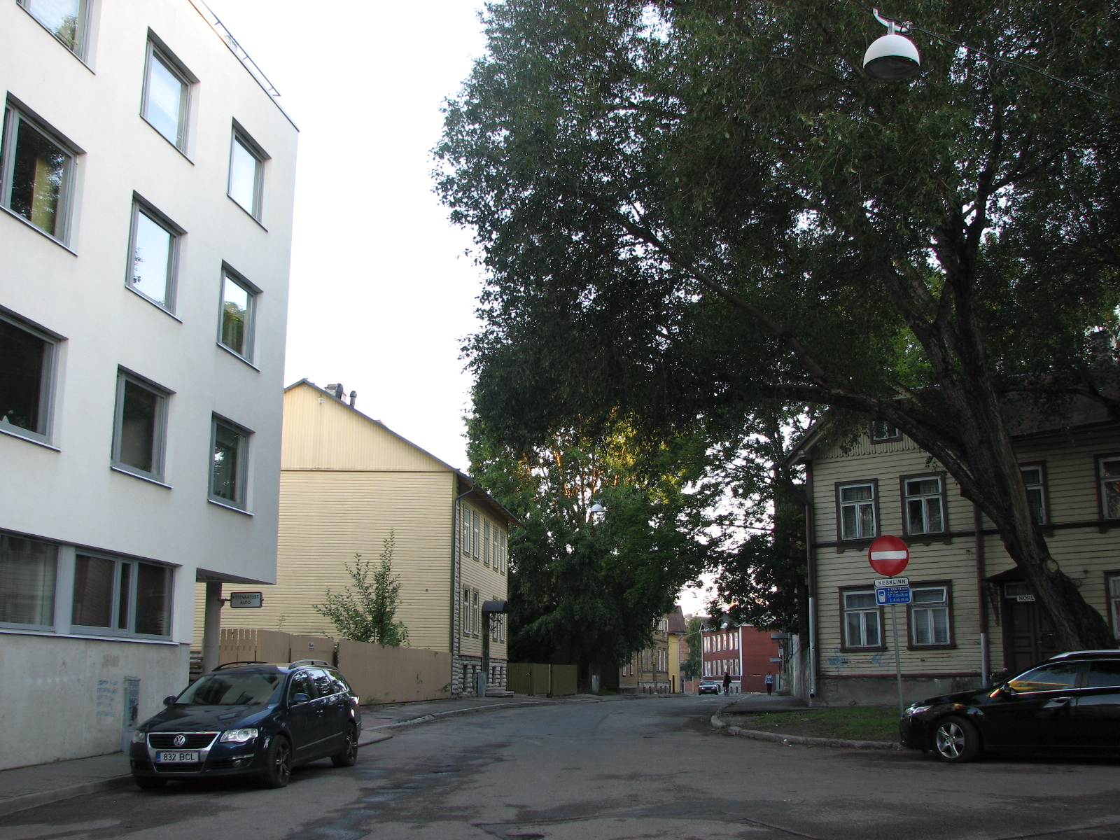 Vaade Magasini tänavale Ravi tänavalt